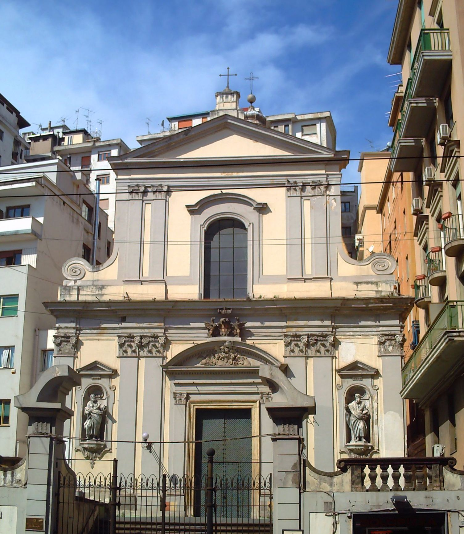 Facciata, Chiesa San Giorgio dei Genovesi (Napoli)